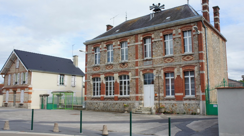 vue de la mairie Mourmelon-le-Petit.